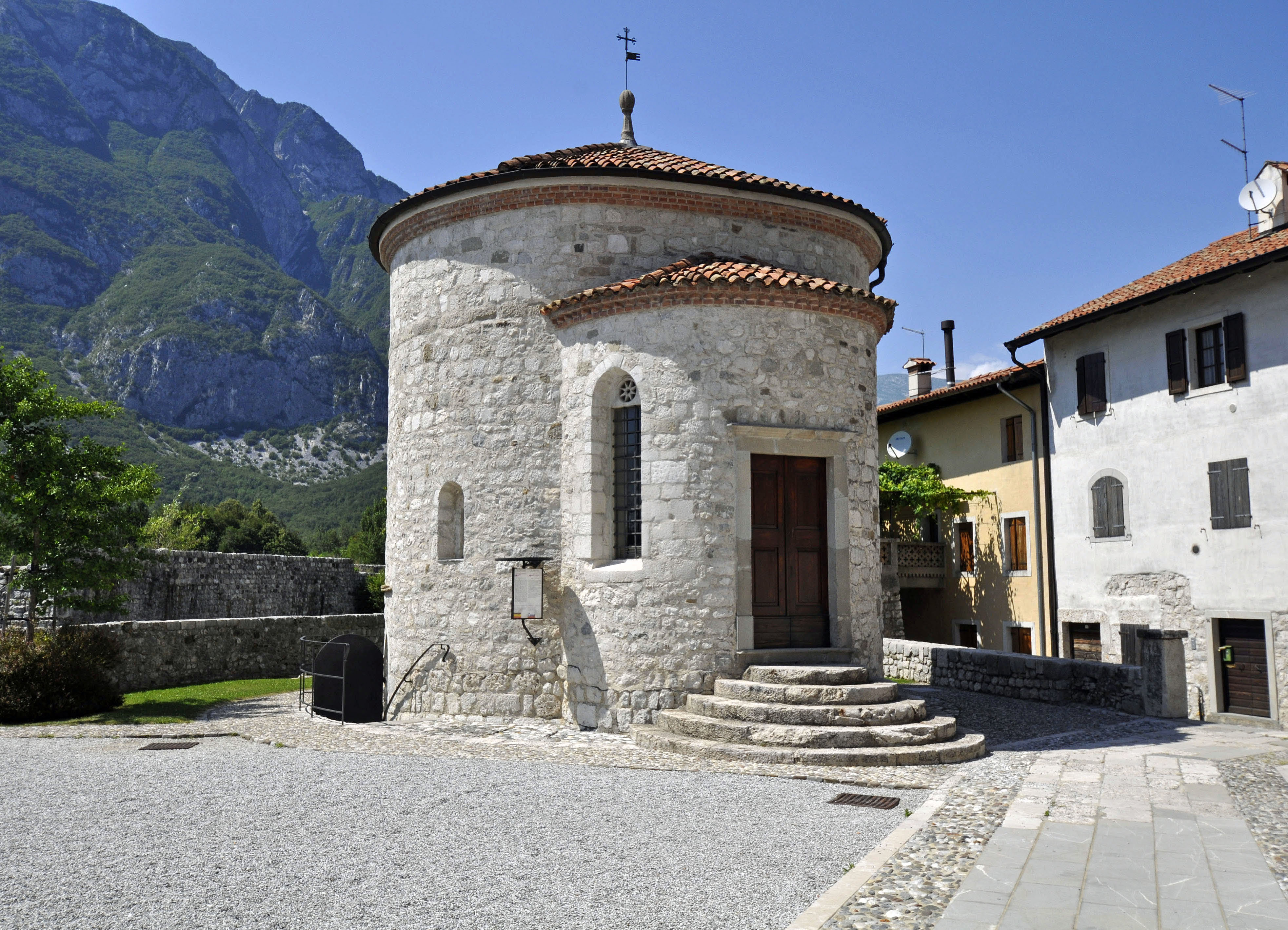 Baptistère (chapelle San Michele) de Venzone